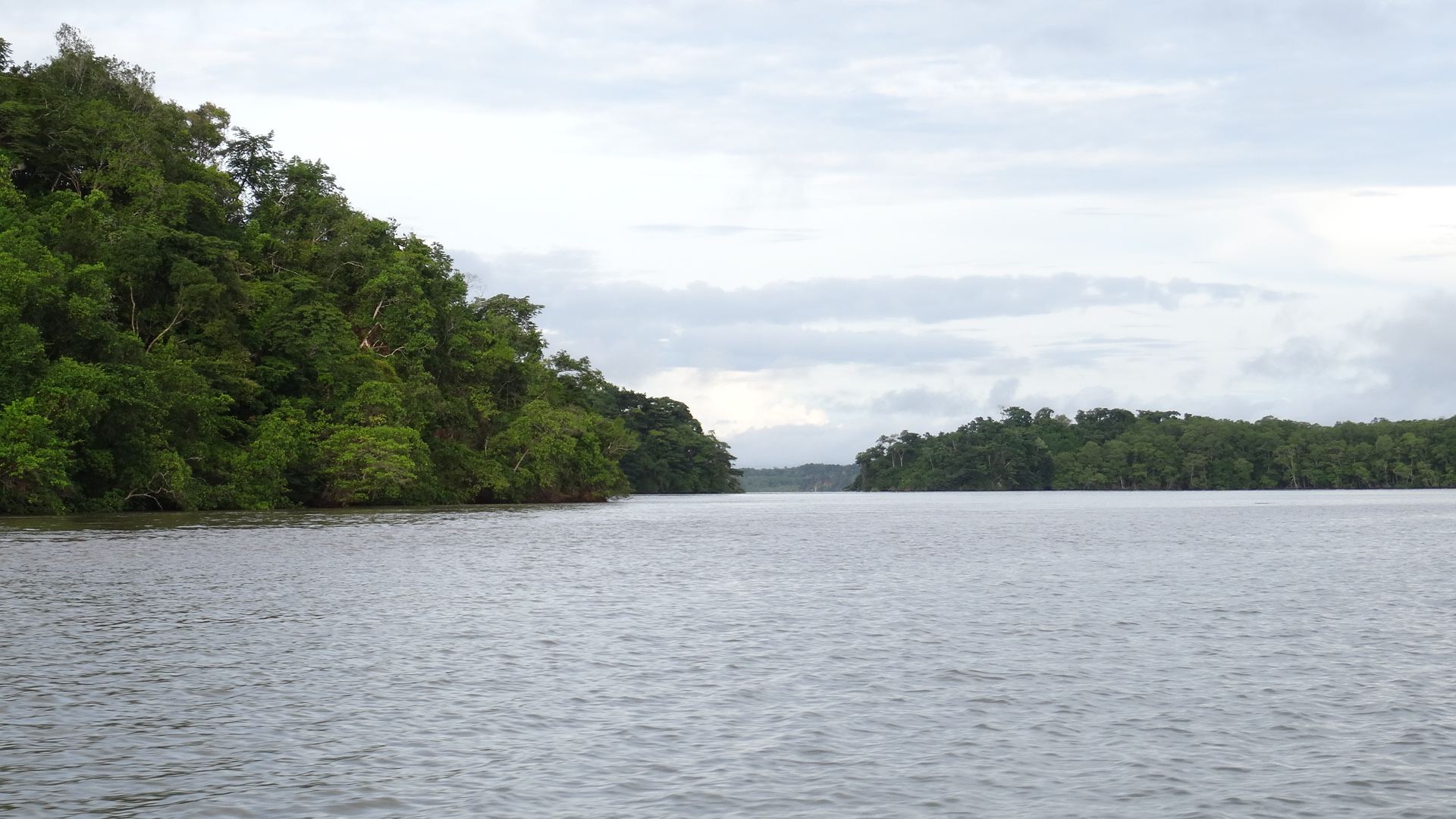 Desembocadura del río Tuira en el golfo de San Miguel, Darién.